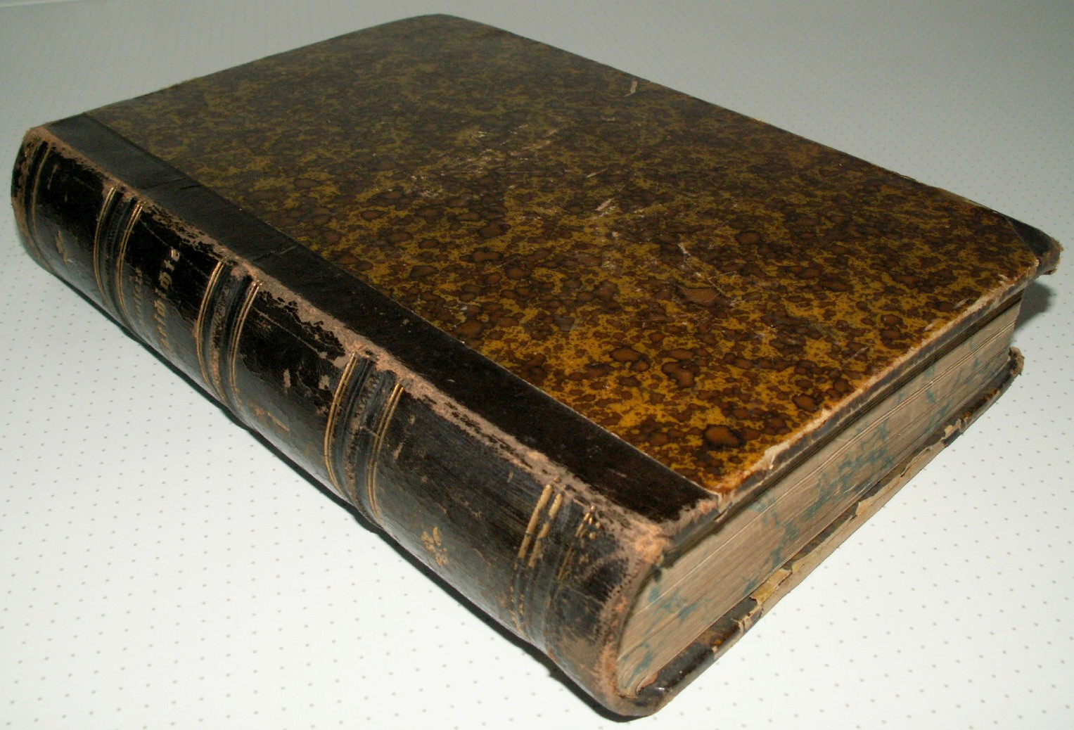 Summary Quelle: selbst fotografiert, 01/2006 Fotograf: Späth Chr. Lizenzstatus: gemeinfrei Licensing